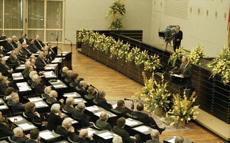 31.1.1984 Festakt zum 100. Geburtstag von Prof. Dr. Theodor Heuss im Bundestag.